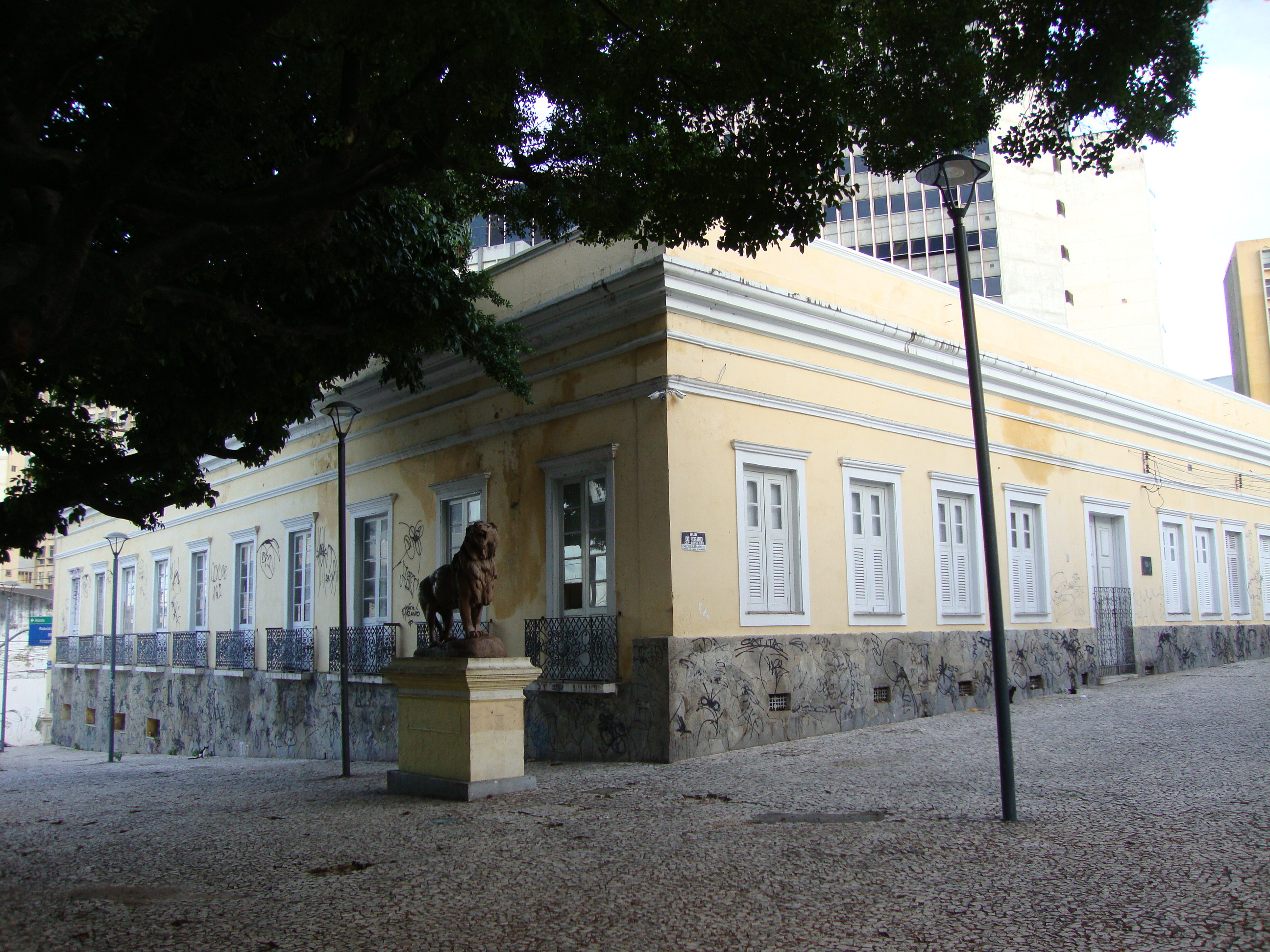 Português do Brasil: Palácio da Luz, em Fortaleza, Ceará, Brasil.